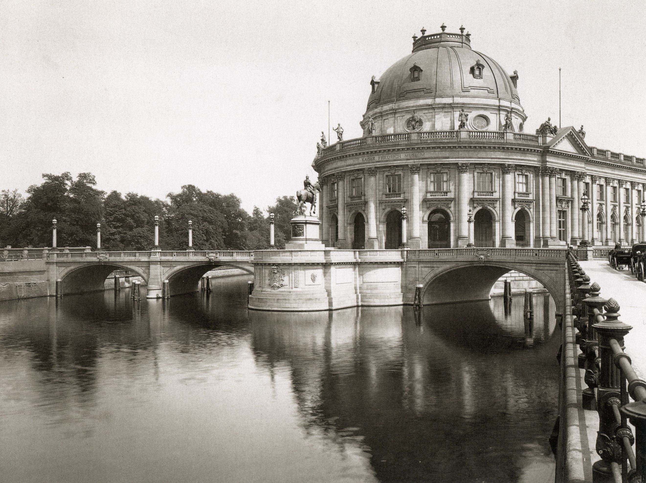 Kaiser-Friedrich-Museum (heute Bodemuseum) und Monbijoubrücken in Berlin